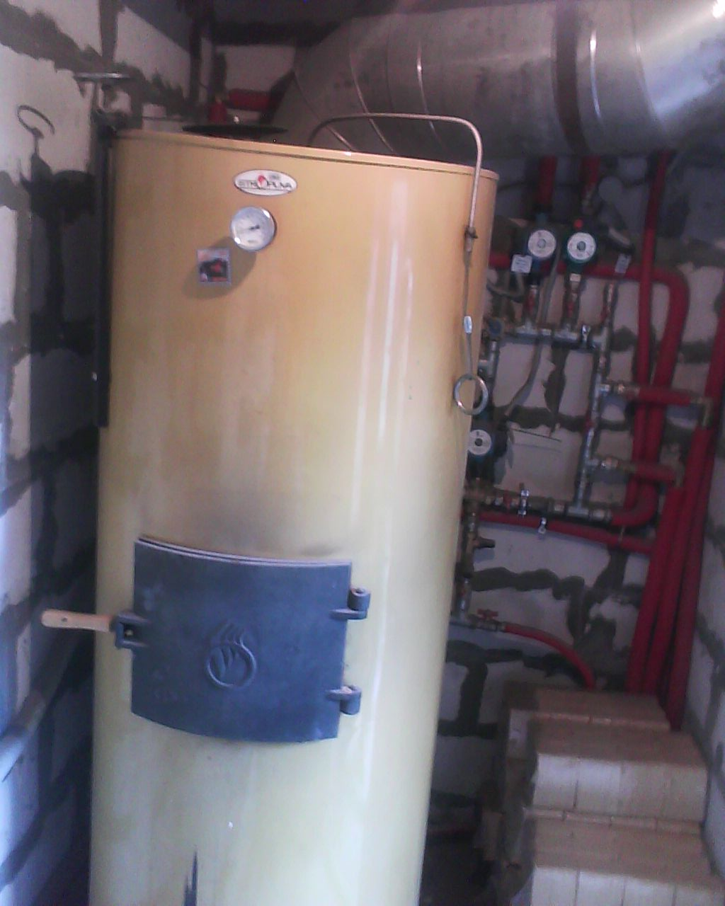 Верхняя часть котла Stropuva s25 в домашней котельной. Сзади видны газоход и насосная группа.